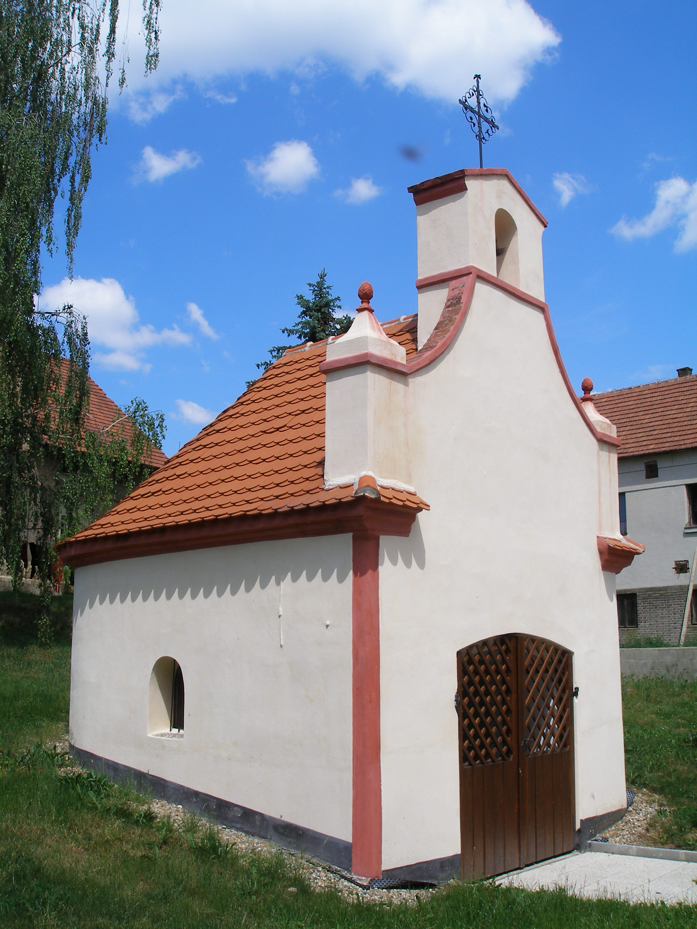 Kaplička v Luníkově.